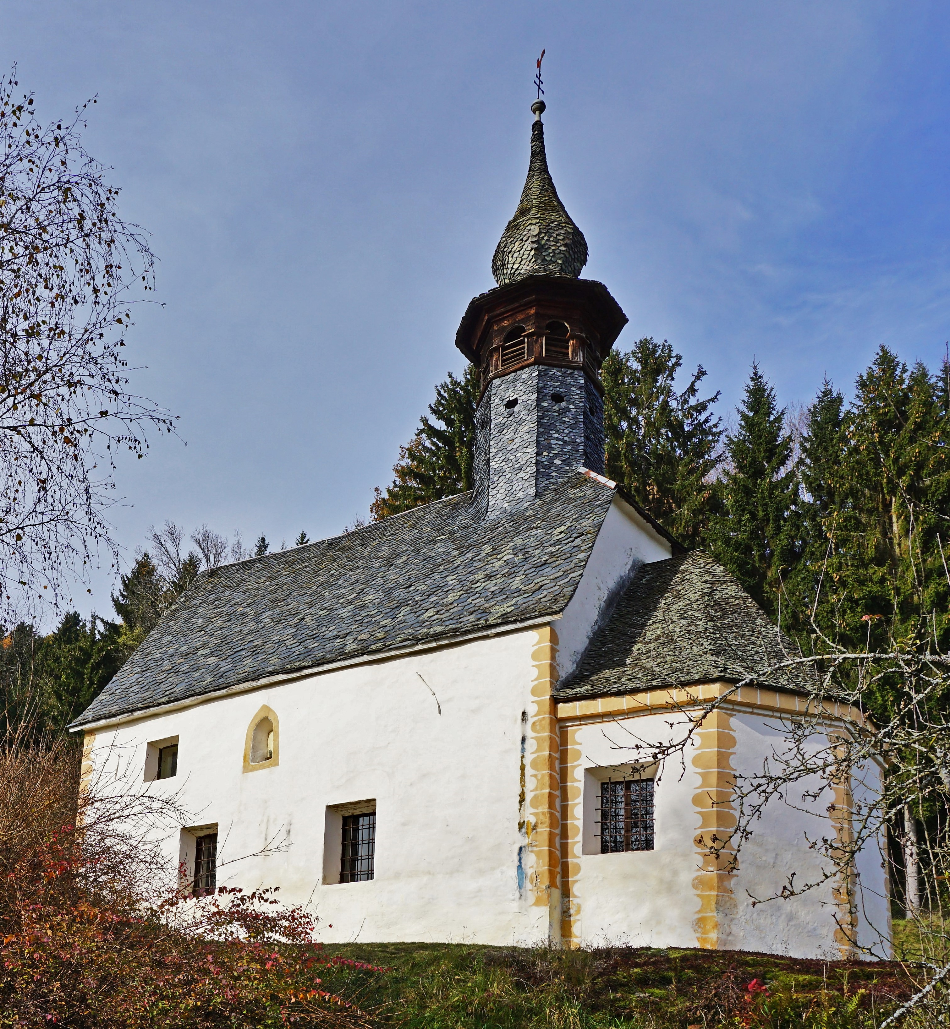 Kath. Filialkirche Hl. Rupert, Nußberg (Moosburg im Kärnten)